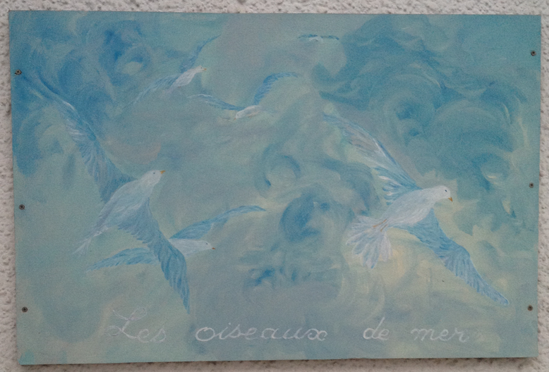 Albert Mayaud Le Touquet-Paris-Plage Plaque " Les Oiseaux de Mer" club de plage dont il était propriétaire, figurant sur la maison qu'il a habitée.